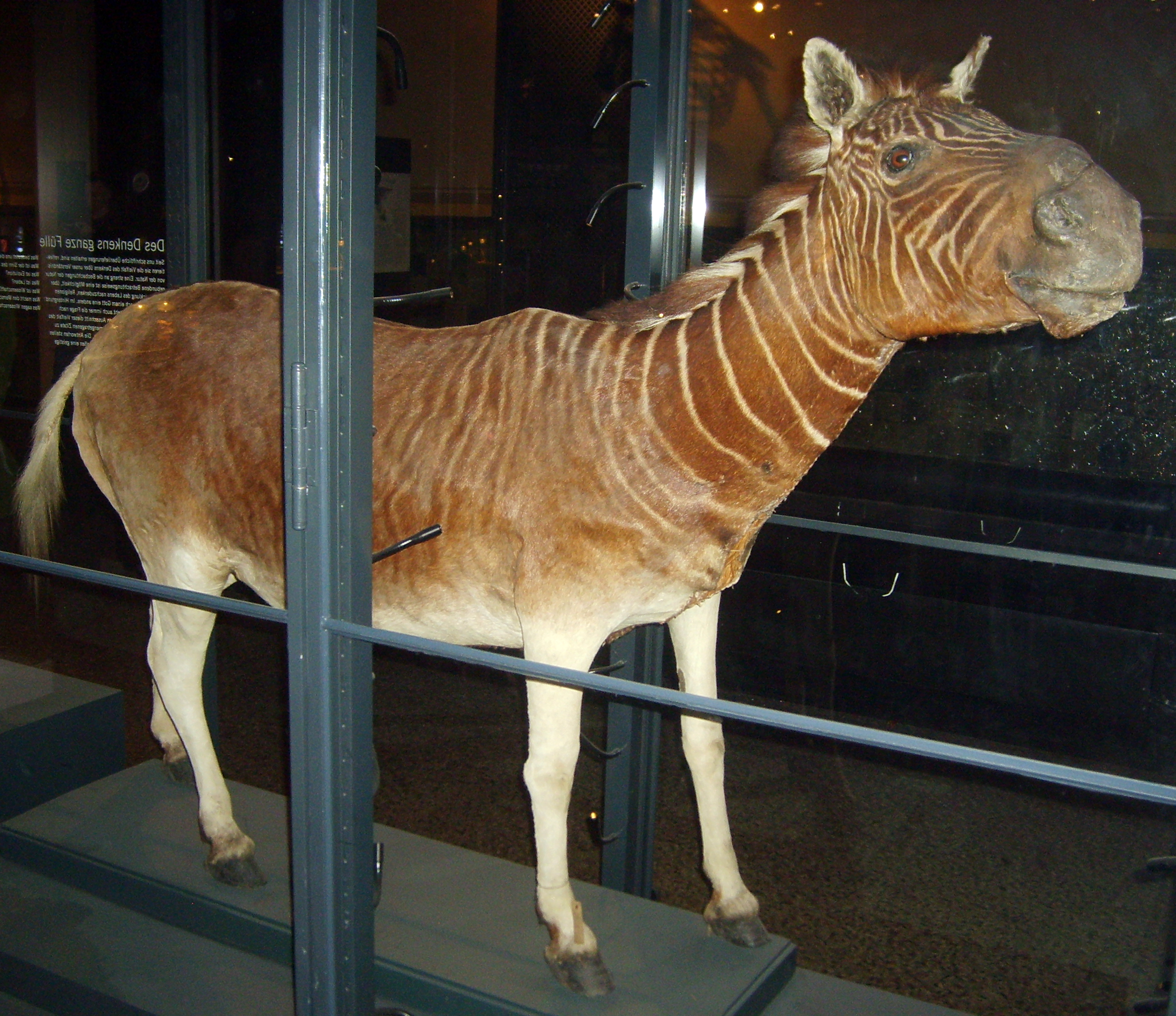 Stuffed quagga, Naturkunde Museum, Berlin.